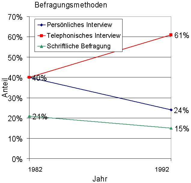 Vergleich von Befragungsmethoden nach Häufigkeit